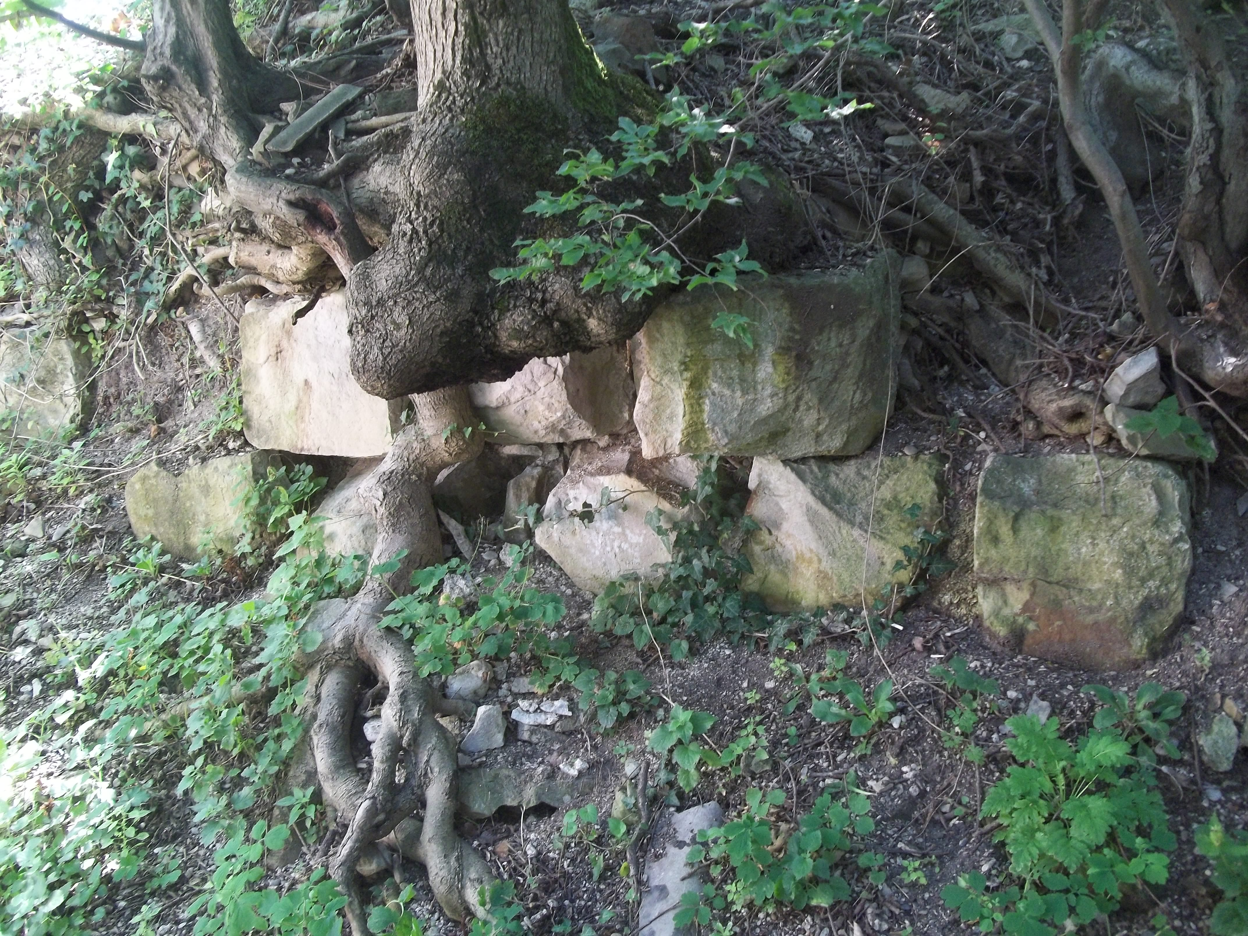 Крепость Дузу-Кале (Краснодарский край)